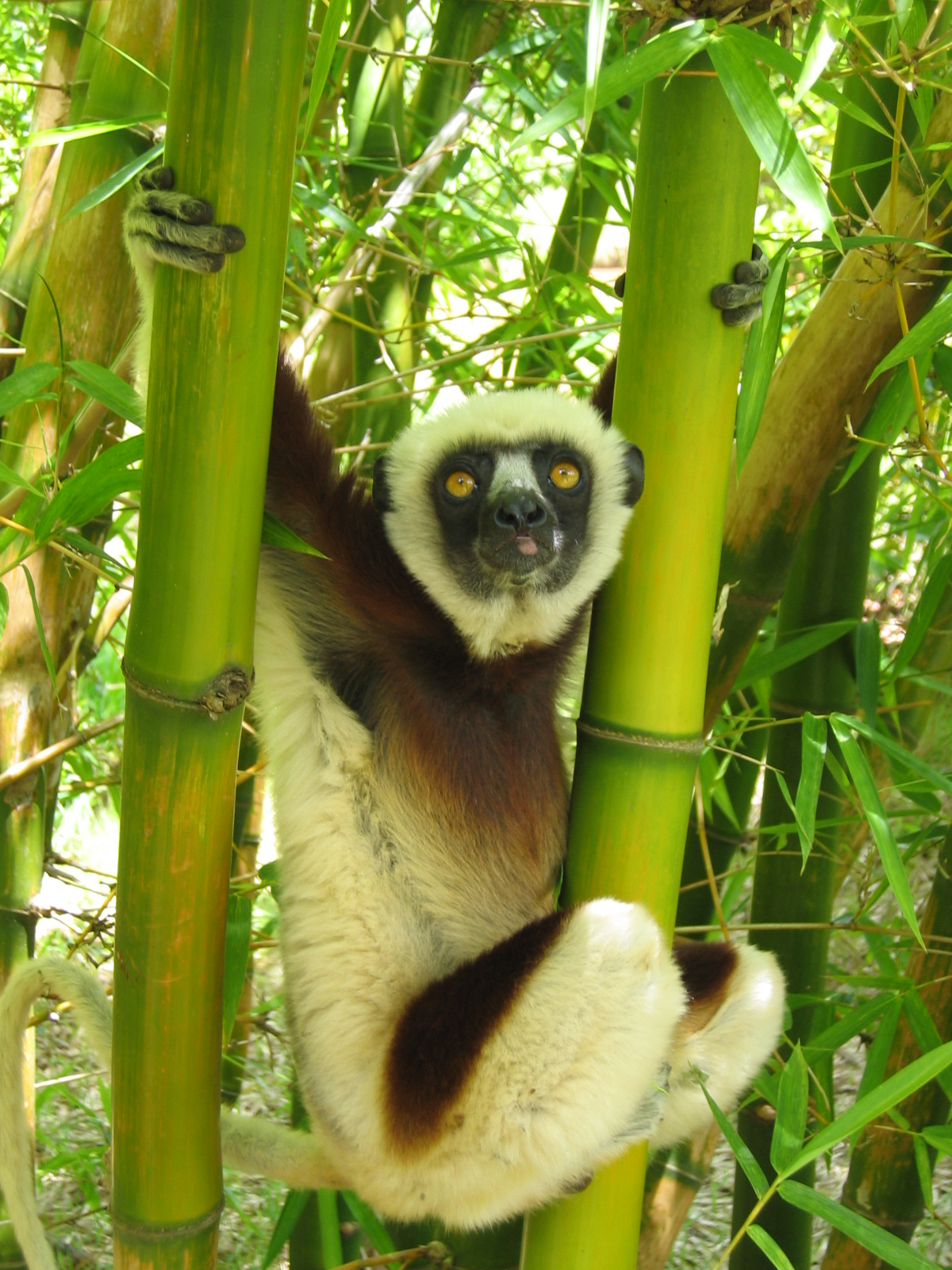 Un propithèque de Verreaux Propithecus verreauxi dans des bambous